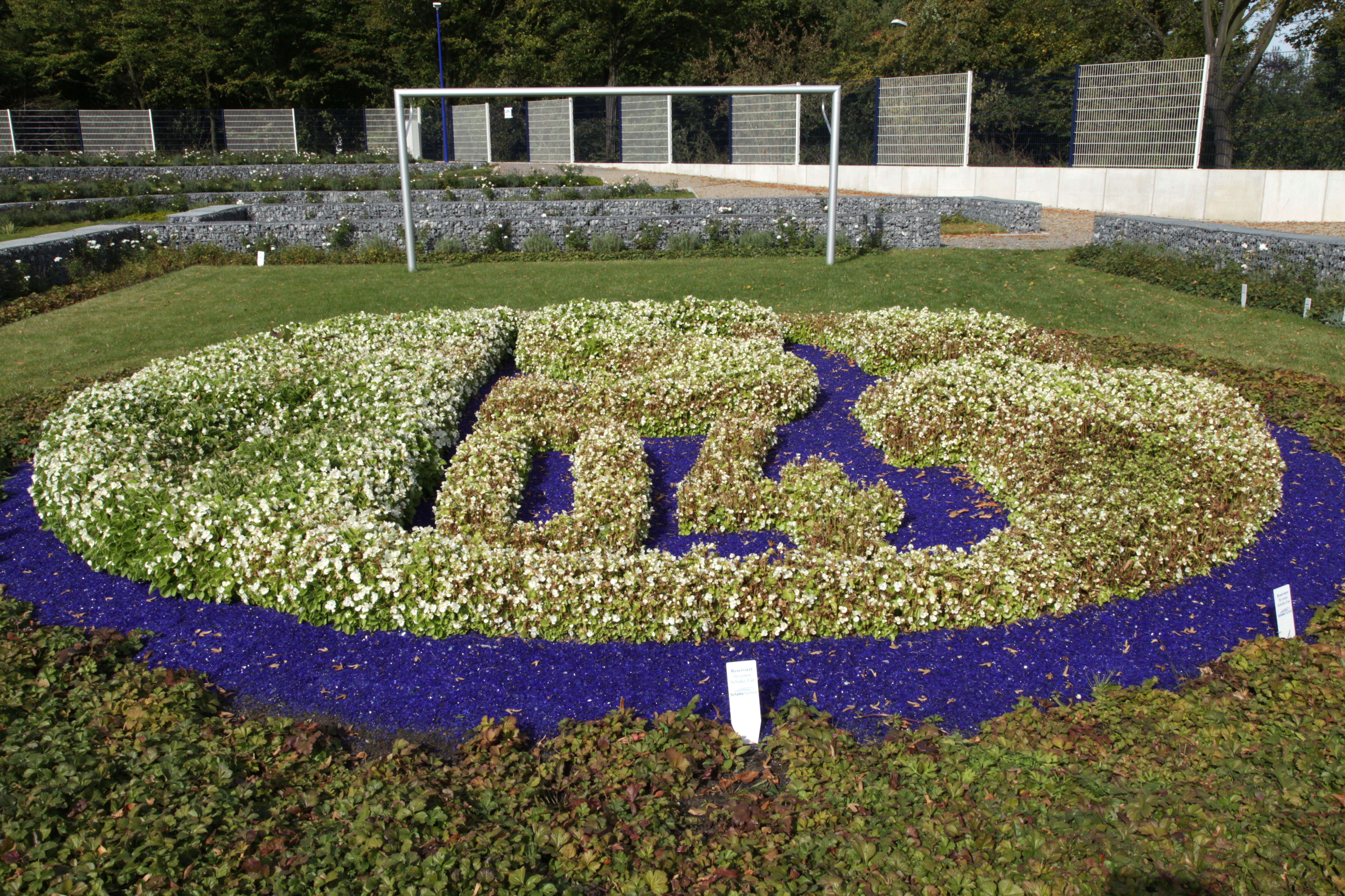 Schalke FanFeld, Harpenstraße/Pfeilstraße in Gelsenkirchen